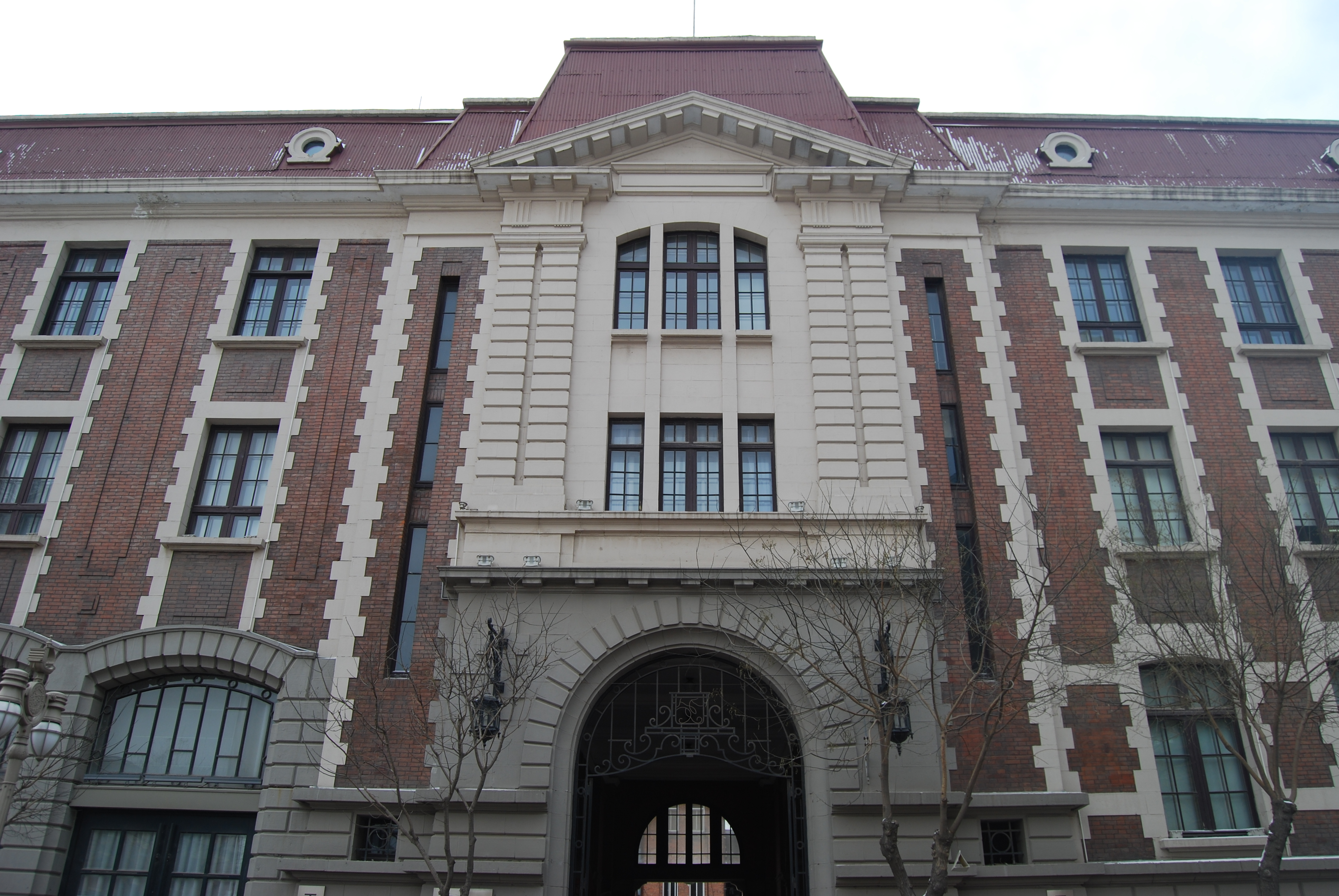 天津解放北路